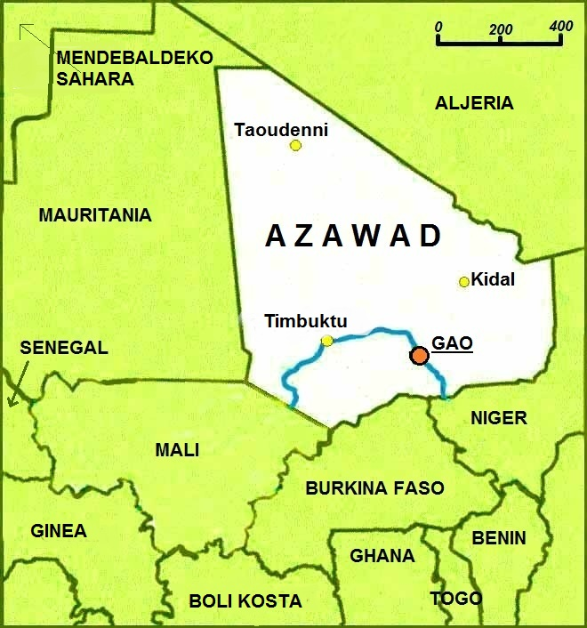 Azawadeko mapa